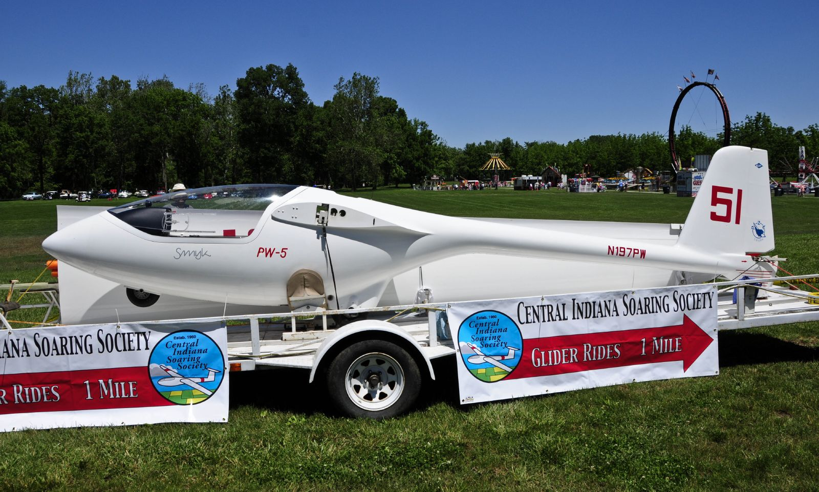 Politechnika Warszawska PW-5 Smyk